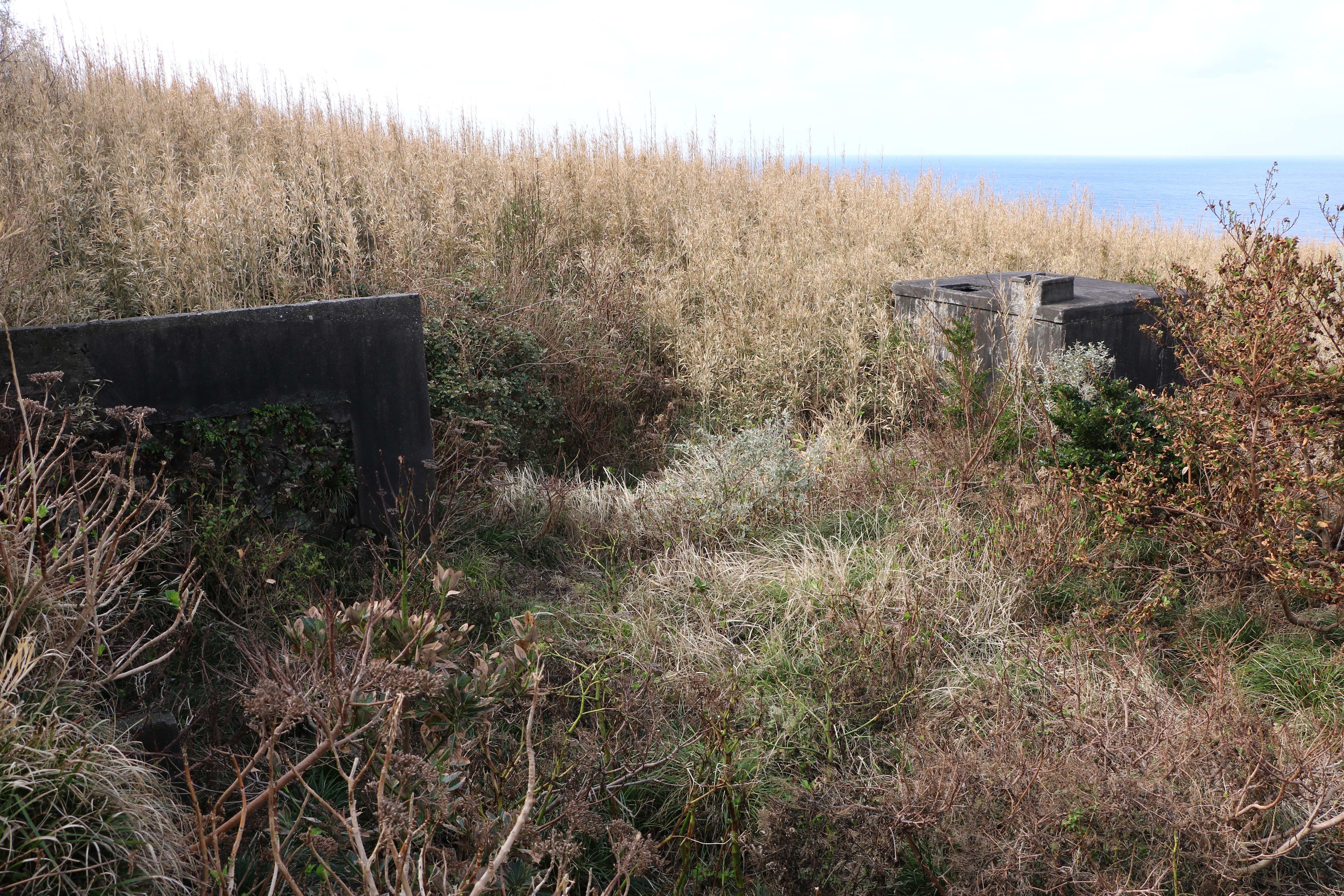 八丈小島鳥打地区の天水タンク跡（東京都八丈町）